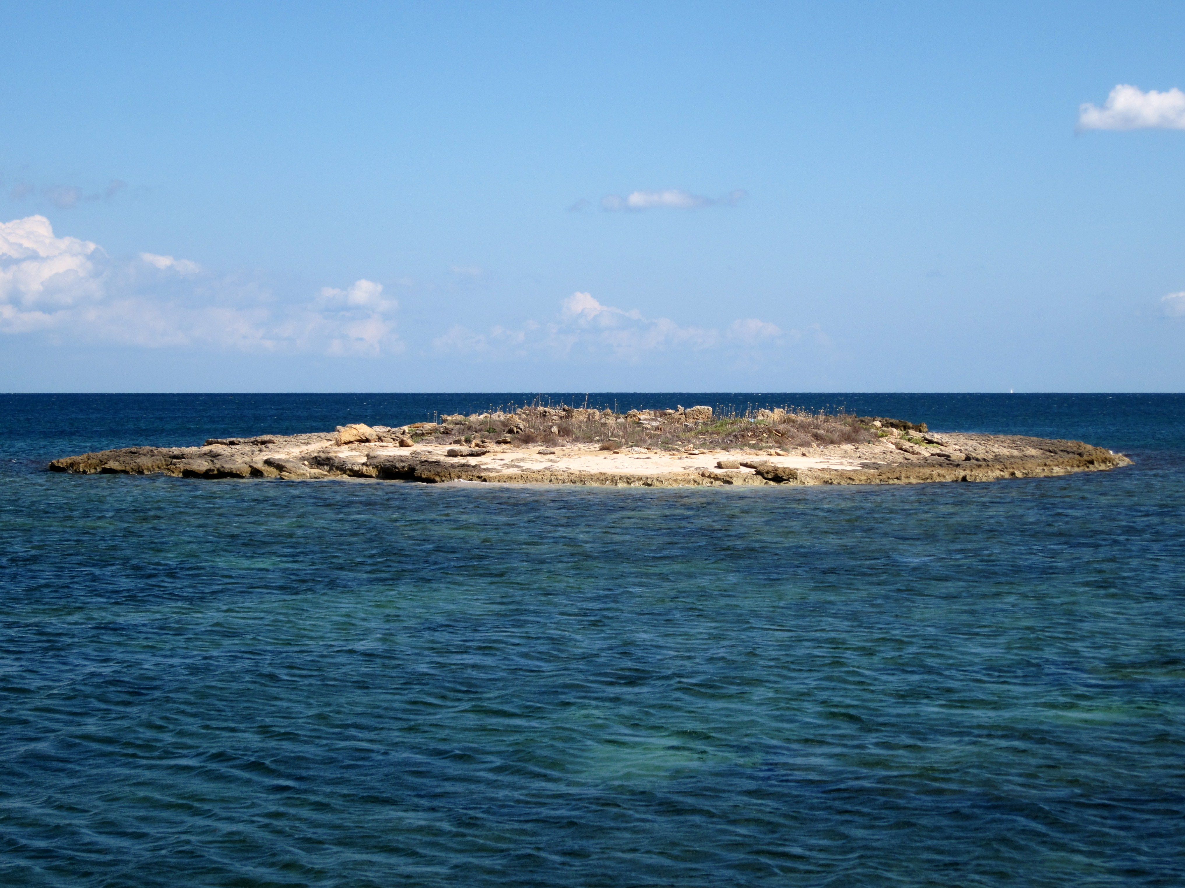 S’Illot des Porros, Gemeinde Santa Margalida, Mallorca, Spanien